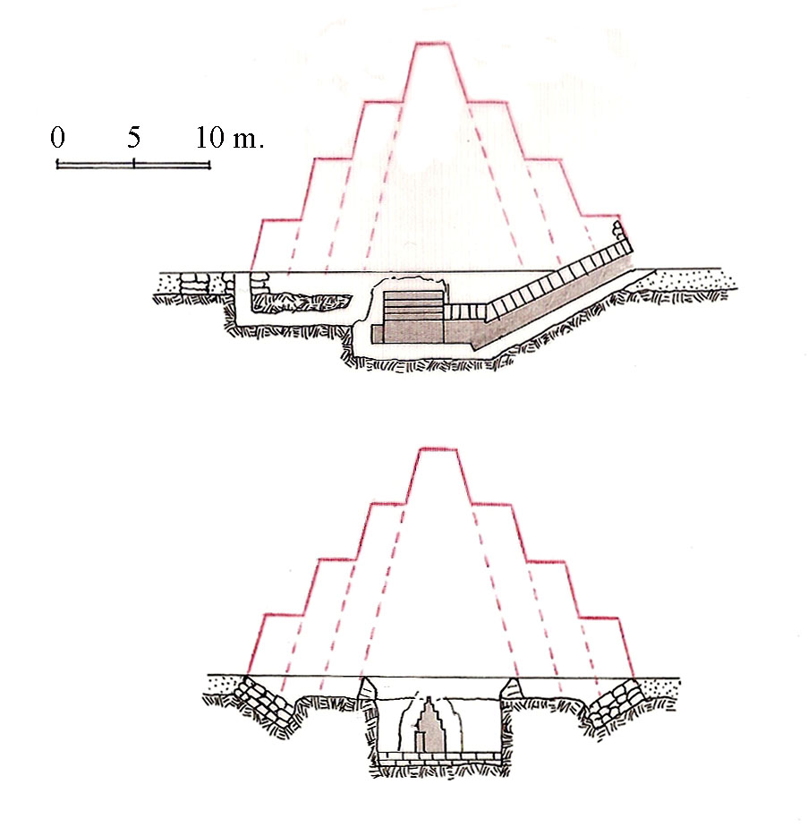 deux coupes de la pyramide satellite à Meïdoum